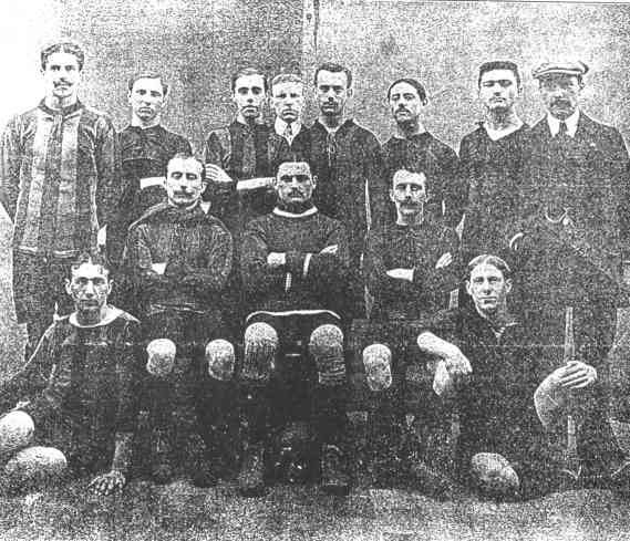 Kampioenenploeg Daring Club de Bruxelles 1911/12 Sylva Brebart, Charles Bauwens, Alfred (Fred) Wright, Prosper Braeckman, Oscar Bossaert, Louis Bessems, Armand Swartenbroeks, Marius Delbecq (trainer). Clément Demeyer, Edgard Dubois, Robert Chapey ("Fred Roberty"), Joseph "Jef" Robyn, René Flamcourt